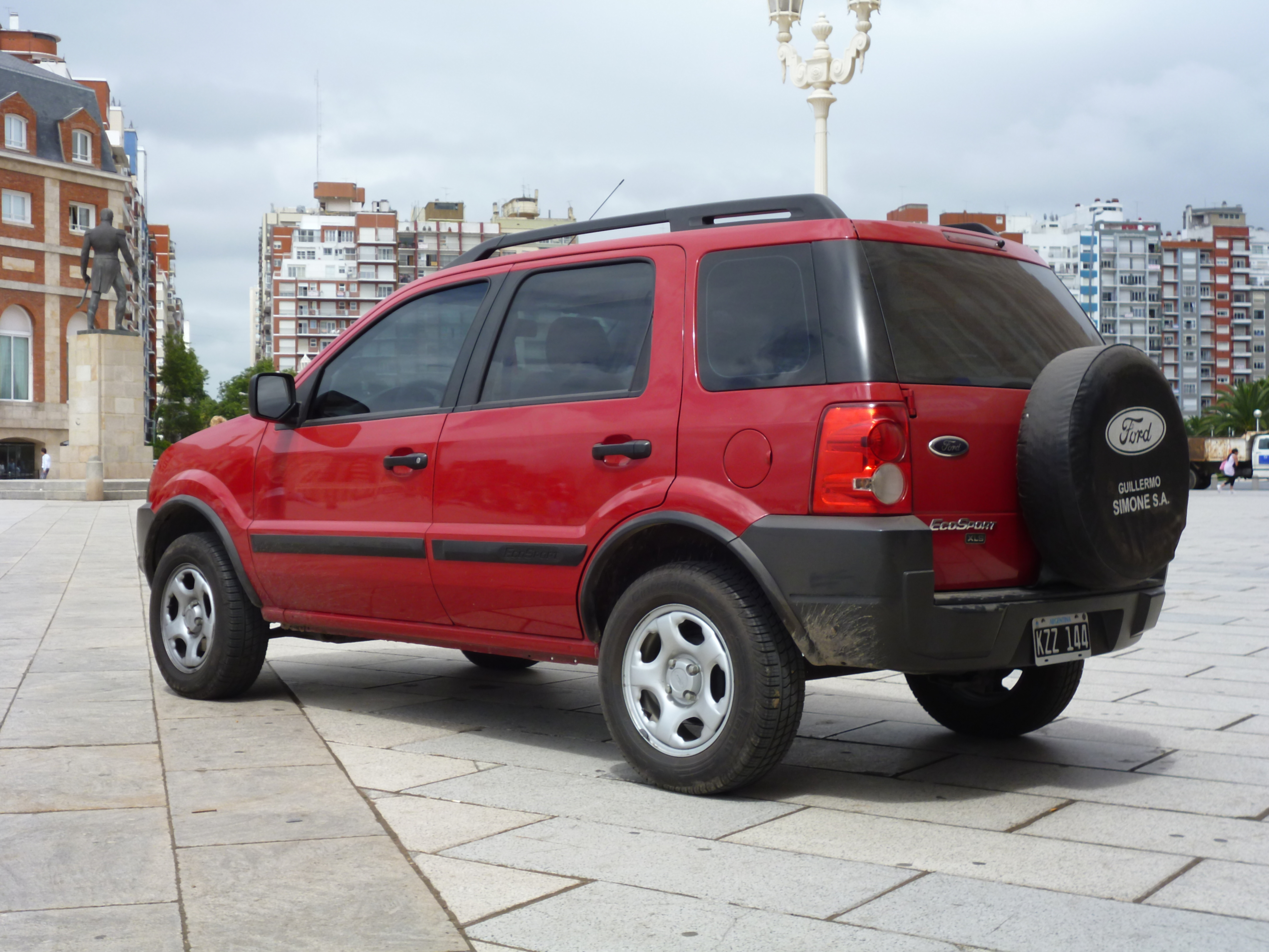 Ford Ecosport estacionada en Mar del Plata, Argentina